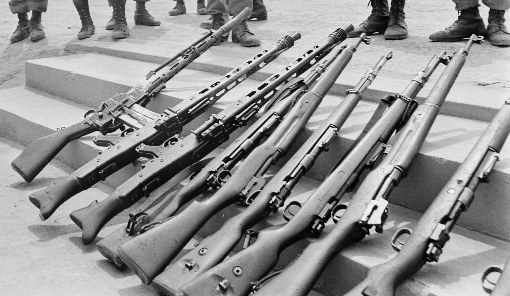 Collectie / Archief : Fotocollectie Anefo Reportage / Serie : [ onbekend ] Beschrijving : Kamp van Angolese Bevrijdingsbeweging FNLA in Zaire, leden bevrijdingsbeweging in het kamp Datum : 22 augustus 1973 Locatie : Zaïre Trefwoorden : Bevrijdingsbewegingen, kampen, leden Persoonsnaam : FNLA Fotograaf : Mieremet, Rob / Anefo Auteursrechthebbende : Nationaal Archief Materiaalsoort : Negatief (zwart/wit) Nummer archiefinventaris : bekijk toegang 2.24.01.03 Bestanddeelnummer : 926-6277